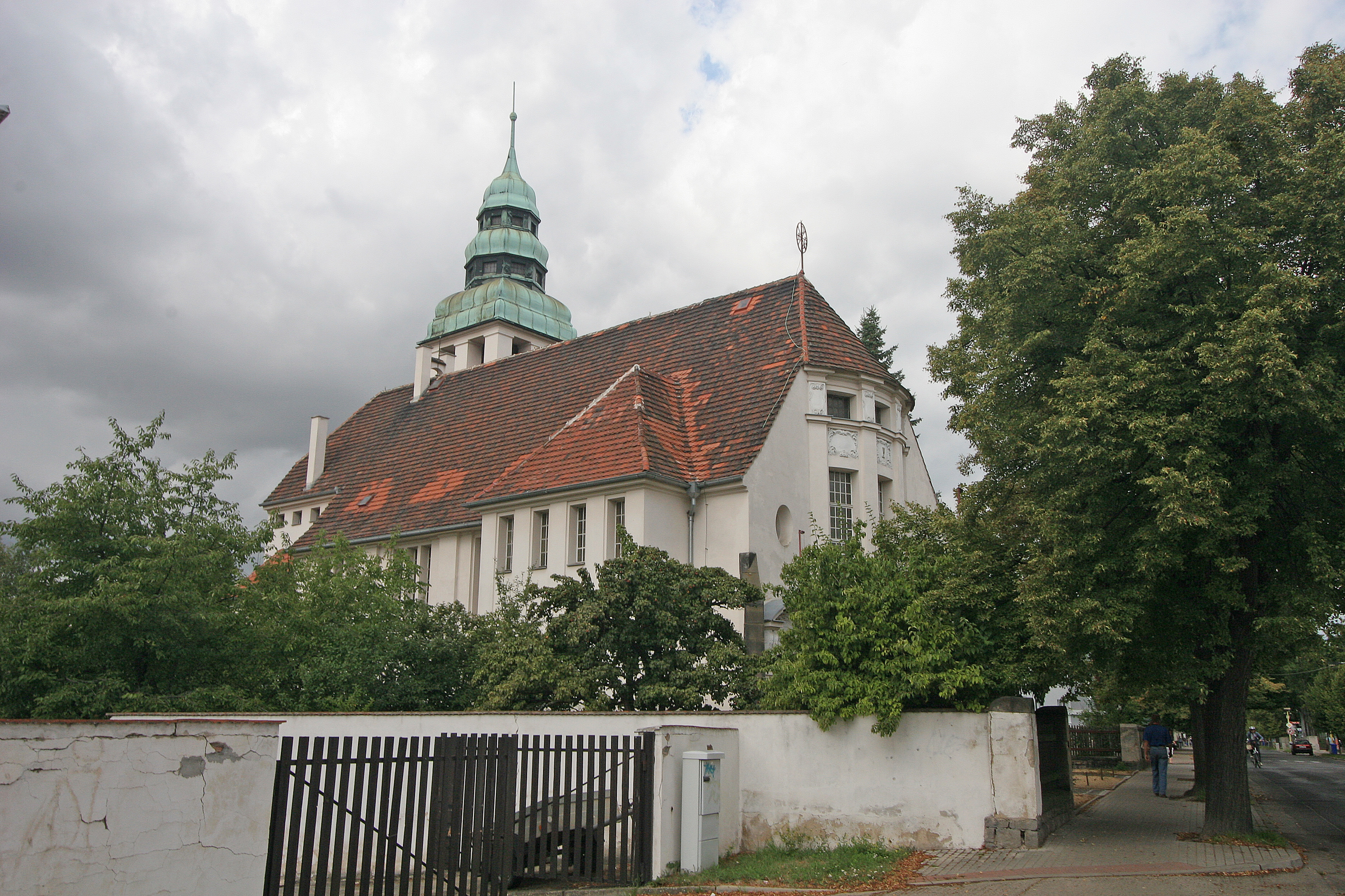 Kostel evangelický (Roudnice nad Labem), Roudnice nad Labem